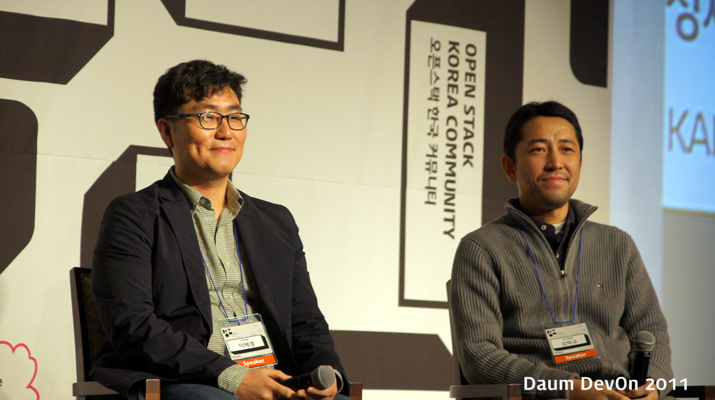 DevOn Daum 2011